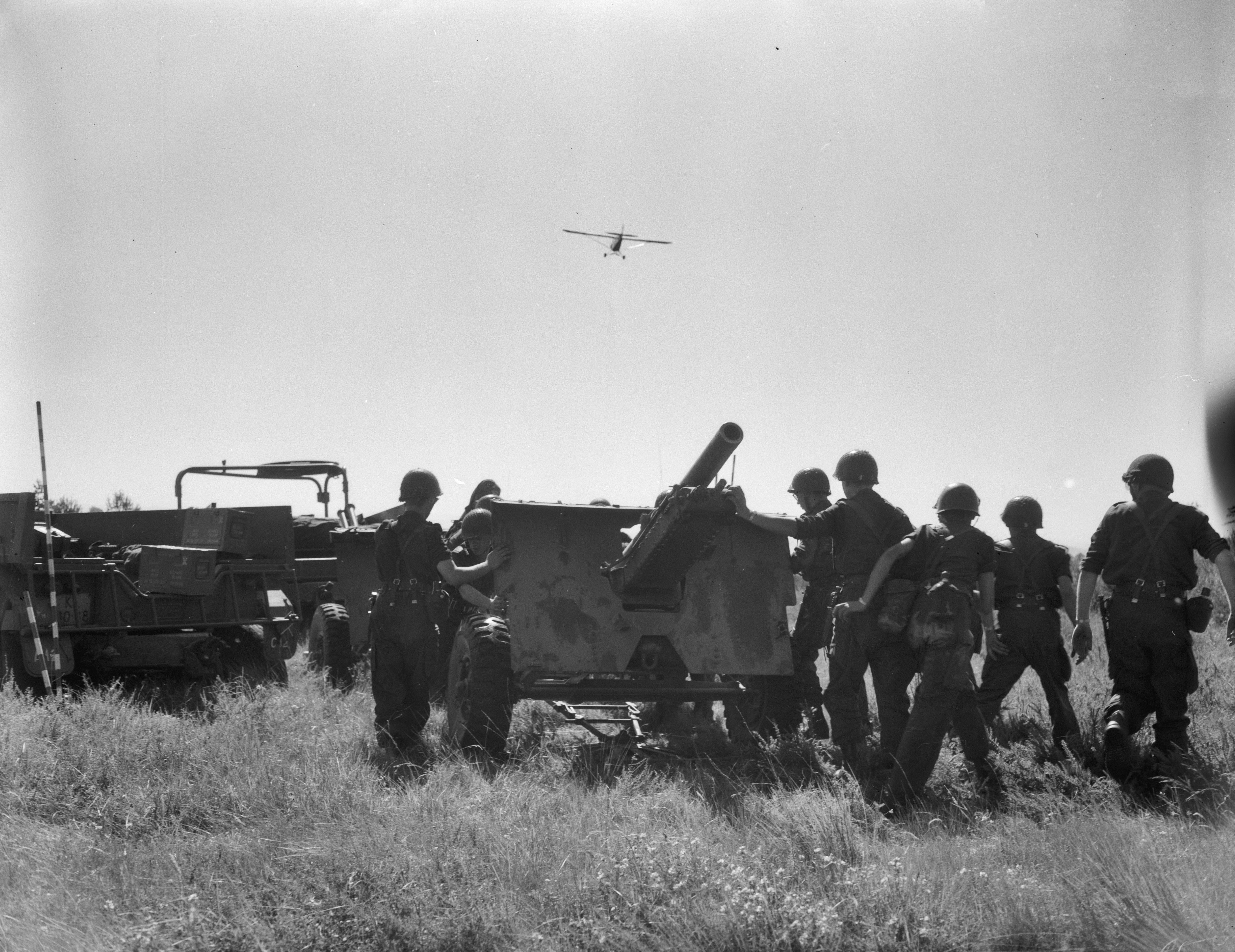 Collectie / Archief : Fotocollectie Anefo Reportage / Serie : [ onbekend ] Beschrijving : Oefeningen La Courtine , batterij van 25 ponders van twaalfde artillerie in stelling gebracht Datum : 8 juli 1959 Fotograaf : Rossem, Wim van / Anefo Auteursrechthebbende : Nationaal Archief Materiaalsoort : Negatief (zwart/wit) Nummer archiefinventaris : bekijk toegang 2.24.01.04 Bestanddeelnummer : 910-5932